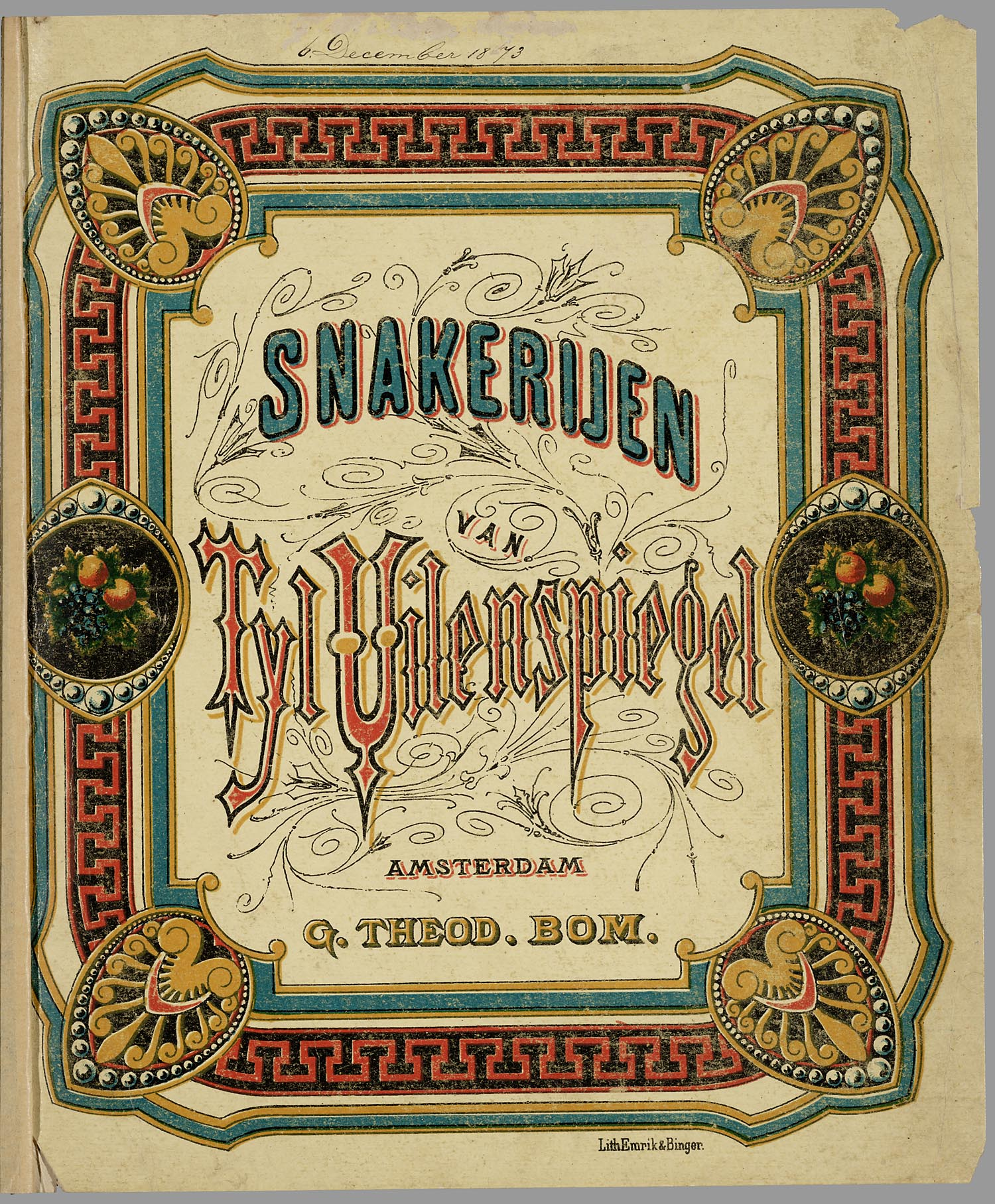 Op de voorkant een geometrische sierrand en sierletters in kleurendruk. Met 6 bladen met op elk blad 2 kleurenlitho's met afbeeldingen van de streken van Tijl. 12 p, 6 bl. pl : gekl. lith // Litho's gedrukt door Emrik & Binger // Met 'Een kort woord vooraf' met informatie over de Middeleeuwse Tijl, waarin wordt vermeld dat 'Tijl wel eens grappen bedacht die niet heel fatsoenlijk waren' en 'deze zullen wij met stilzwijgen voorbijgaan' // Datering: niet in Brinkman; in Lust en Leering geschat op ca. 1870, handgeschreven datum op voorplat '6 December 1873' // Ingekleurd Prentenboeken // Schelmenverhalen